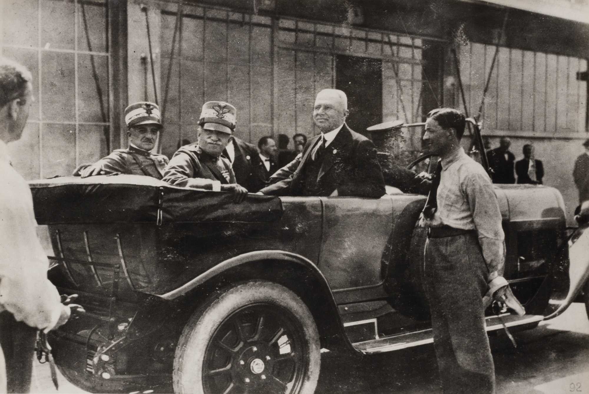 Il Re Vittorio Emanuele III con il suo seguito in limousine che si congratula con i corridori Fiat presso lo stabilimento Fiat Lingotto, Torino 1923